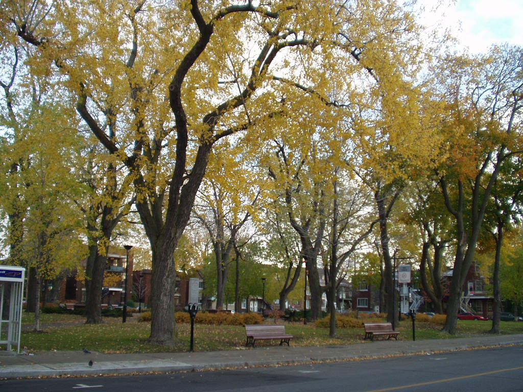 Parc Garneau, Ville-Émard, Montréal